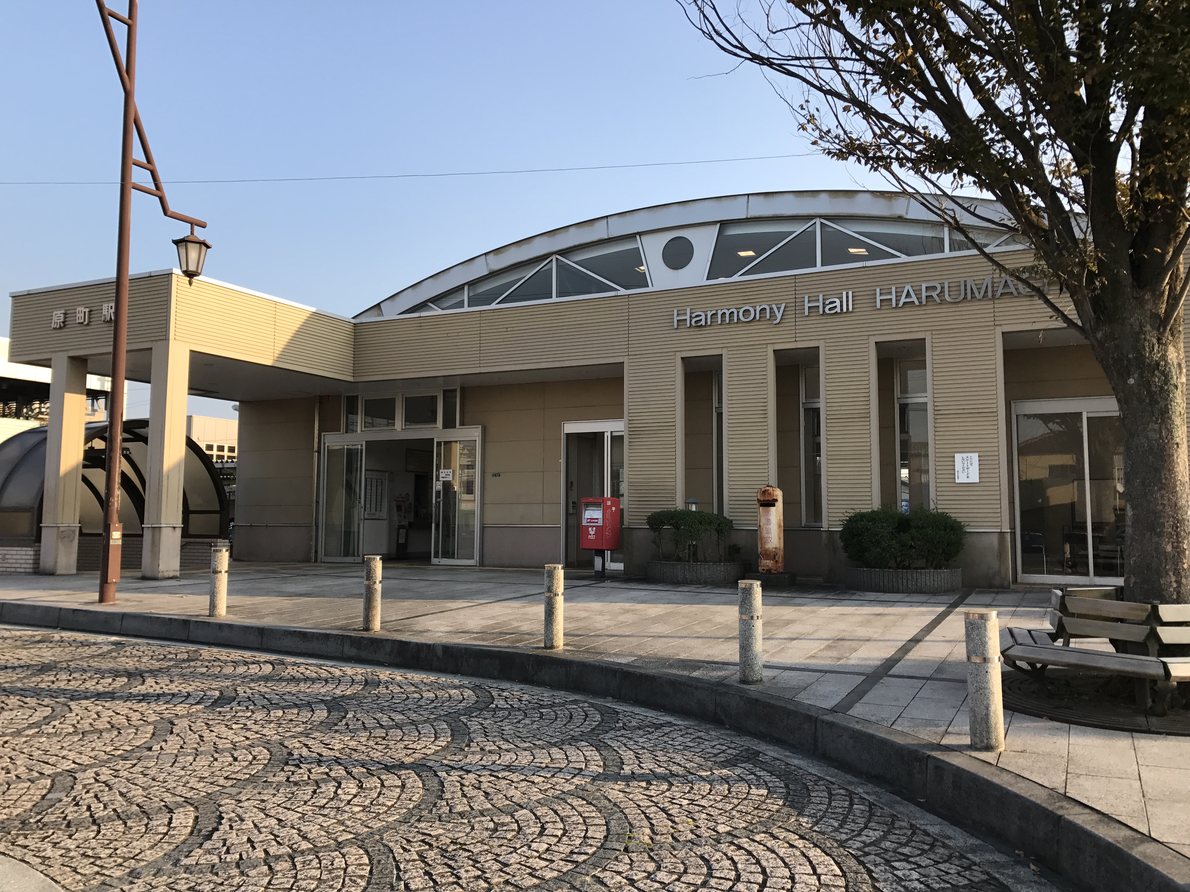 原町駅駅舎